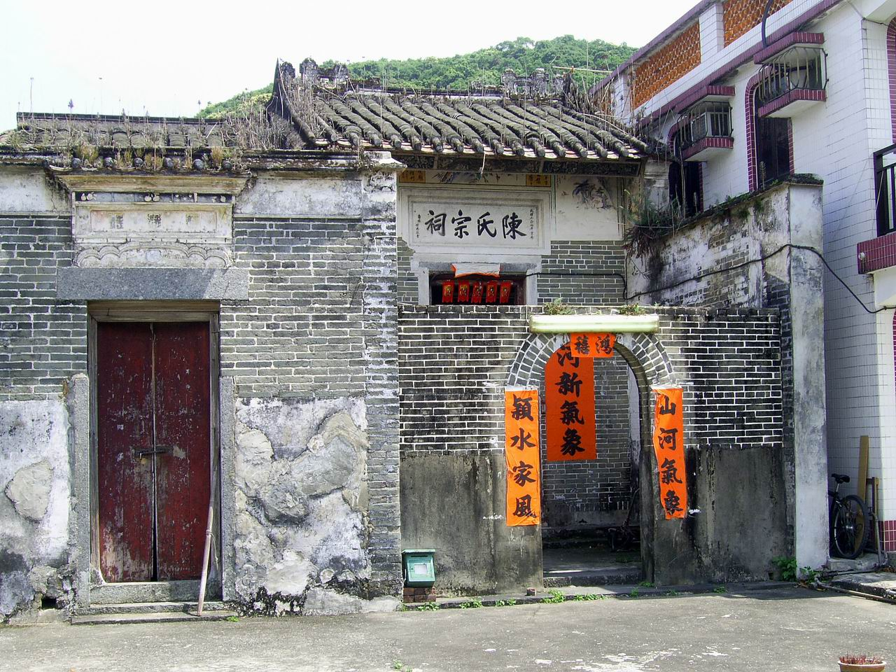 社山村陳氏祠堂